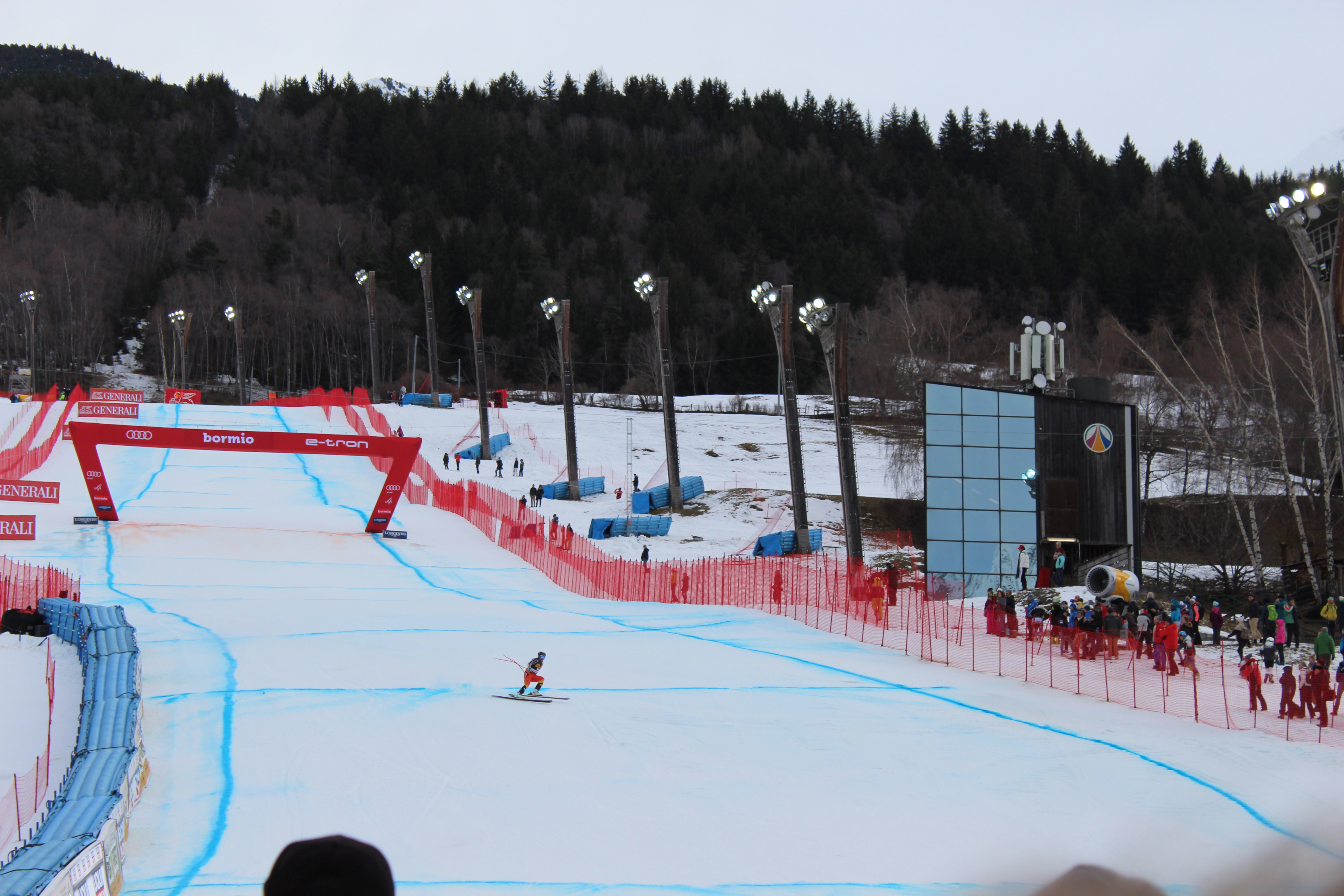 Lo sciatore norvegese Benjamin Thomsen all'arrivo della Pista Stelvio di Bormio, durante la discesa libera del 27 dicembre 2019, valida per la Coppa del Mondo di sci 2019-2020.